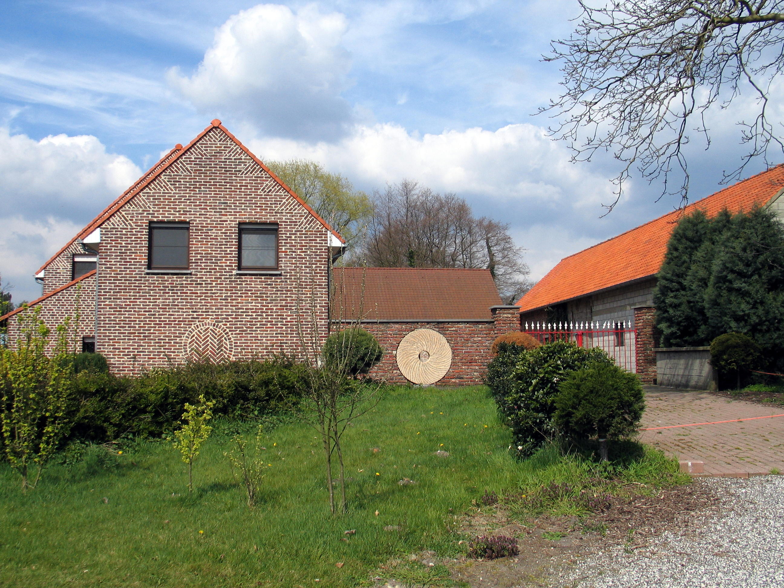 De Plompaertmolen in Diepenbeek, België